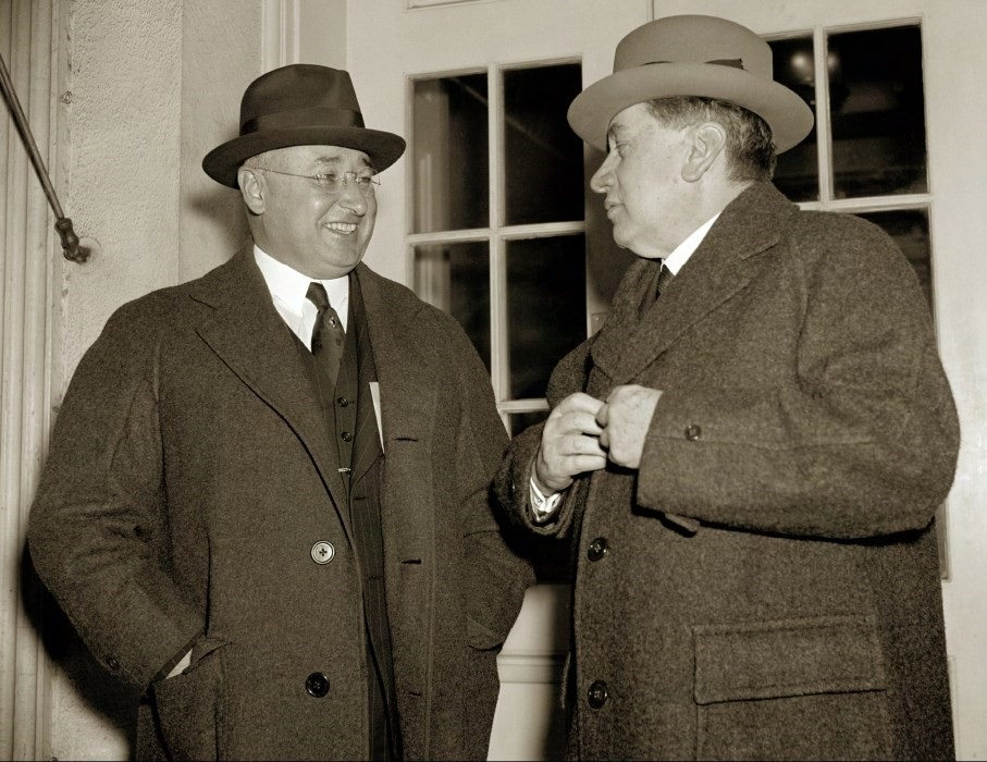 Arturo Alessandri, ex presidente de Chile, acompañado por Alfonso Grez, ex Cónsul General de Chile en Nueva York, saliendo de la Casa Blanca luego de una invitación extendida por el Presidente Franklin Delano Roosevelt, el 1 de noviembre de 1939. Fotógrafo: Harris & Ewing. Fuente: Library of Congress, Prints and Photographs Division, Washington, DC.